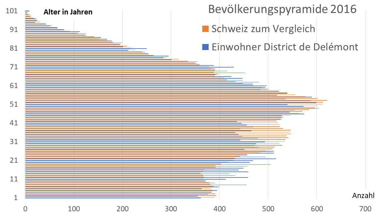 Bevölkerungspyramide 2016, ein Säulendiagramm nach Jahrgang zur Altersverteilung der Einwohner im District de Delémont